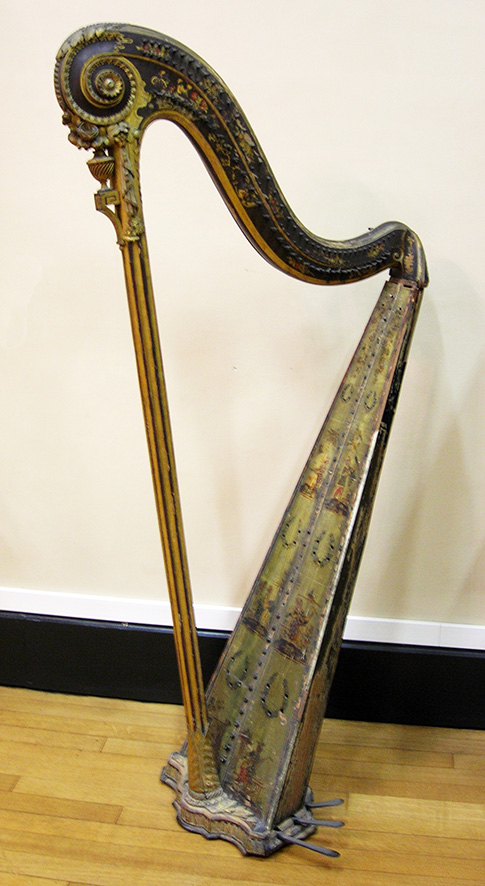 Harp.Museum of châlons-en-Champagne (51) France.